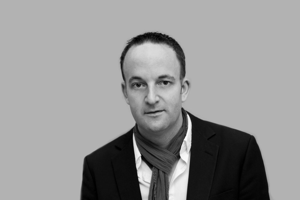 Prof. Dr.-Ing. Markus Haid